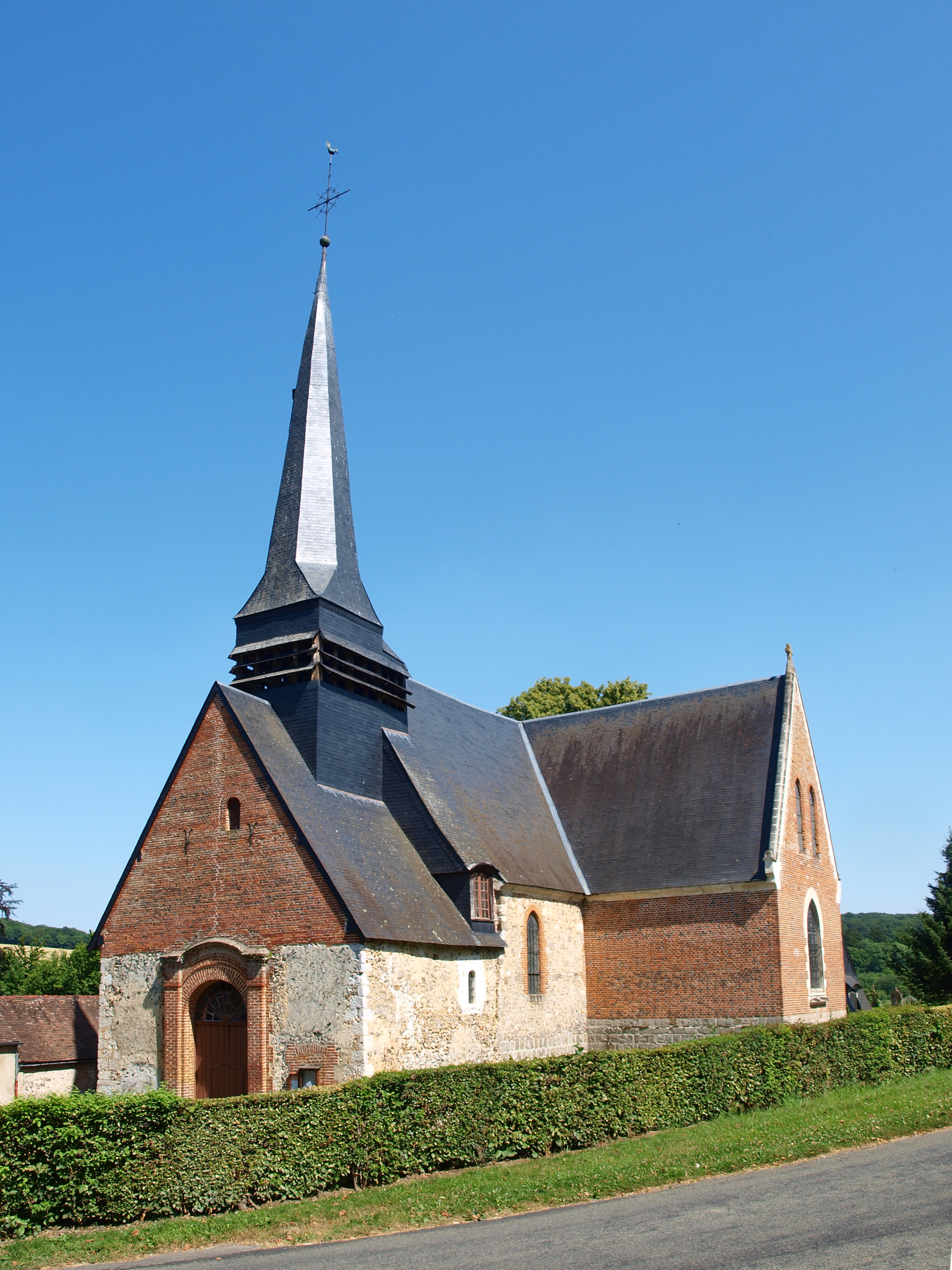 Achy (Oise, France) ; église